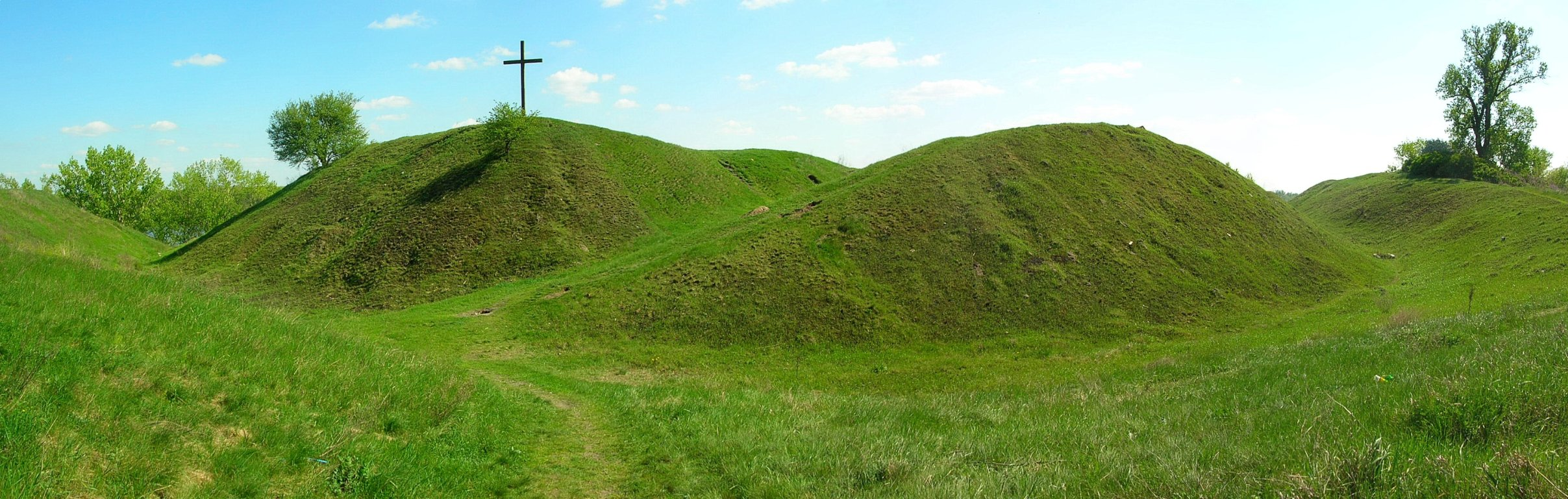 Grodzisko Wyszogród - widok z północy